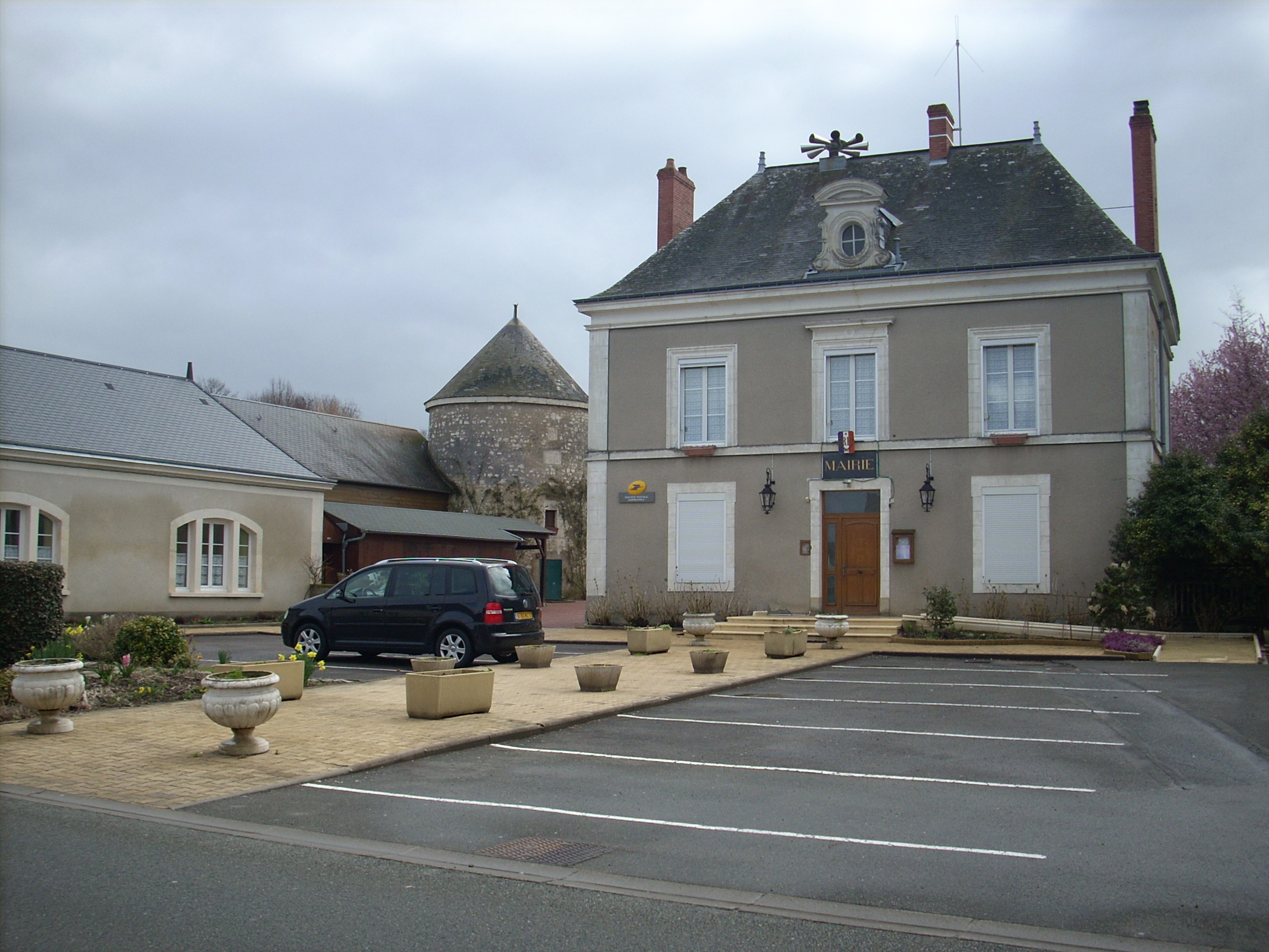 MAIRIE DE VERNEIL-LE-CHÉTIF (SARTHE)